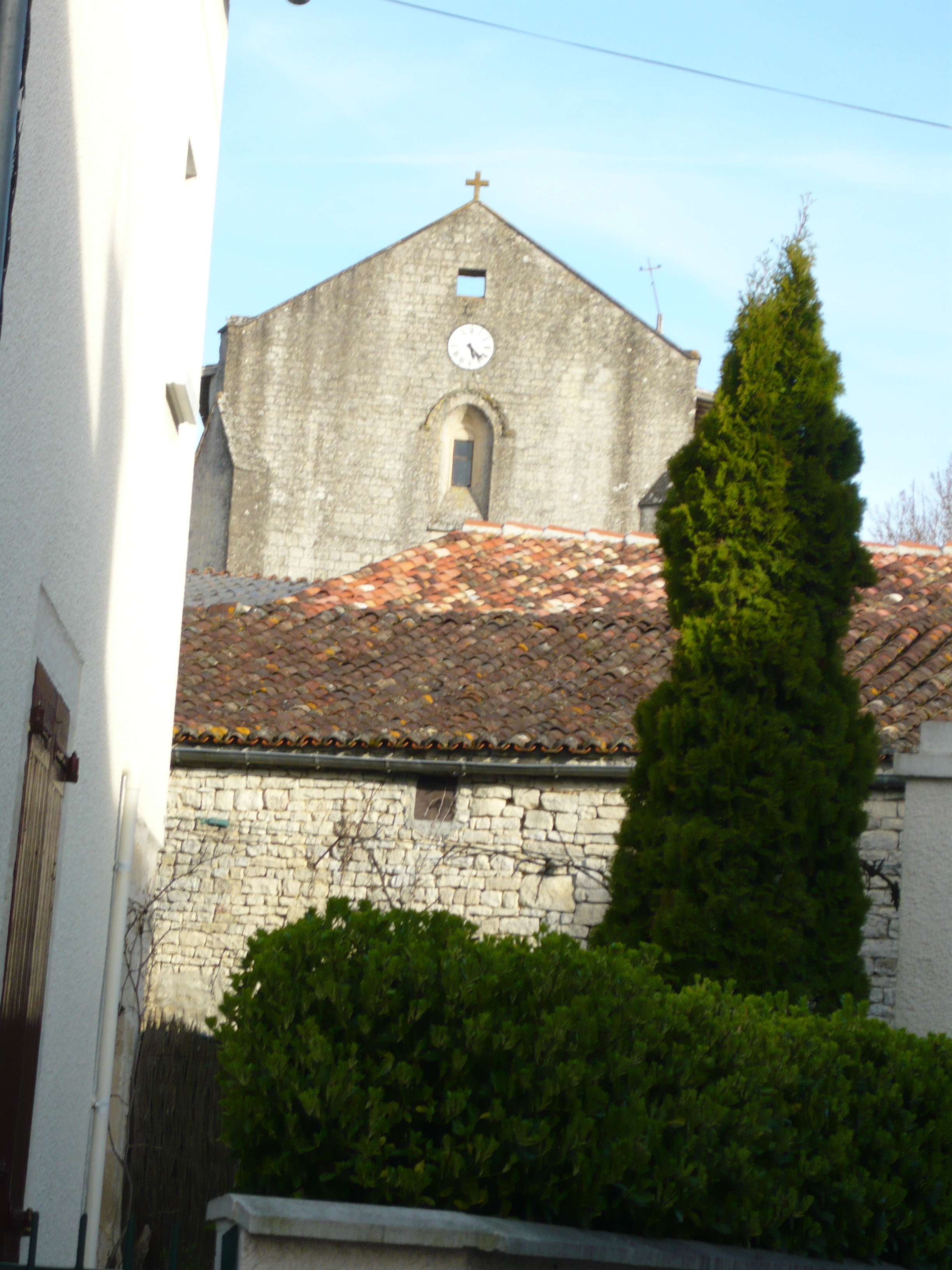 L'église de Dampierre-sur-Boutonne vue depuis le village bas.